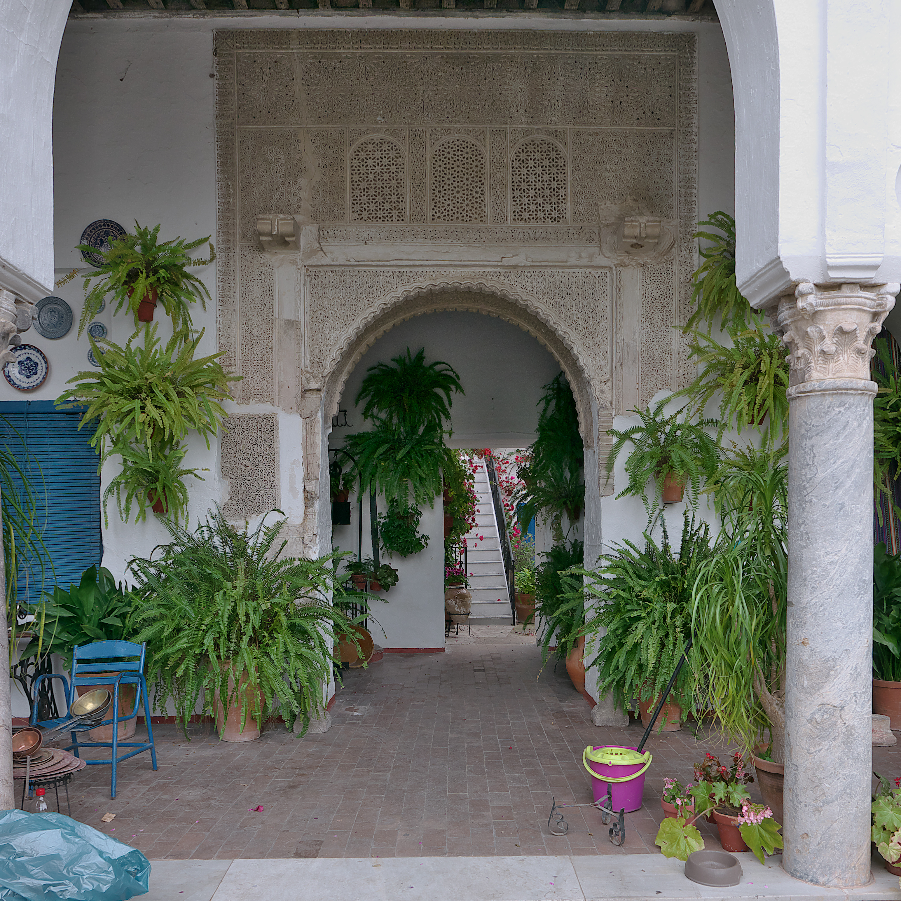 La arquitectura civil mudéjar en Córdoba.